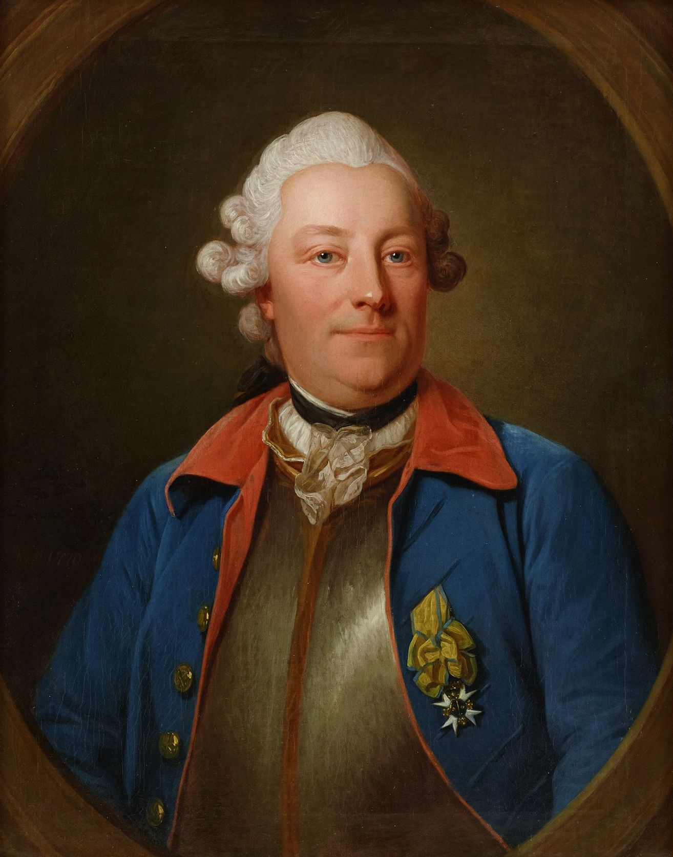 Porträtt föreställande generalmajoren friherre Fredrik Ulrik Wrangel af Sauss iklädd uniform m/1756 för Östgöta kavalleriregemente samt bröstharnesk. Rocken har förgyllda knappar och han bär svärdsorden - midjebild Signerad och daterad Krafft 1770. Olja på duk, 69 x 55 cm.